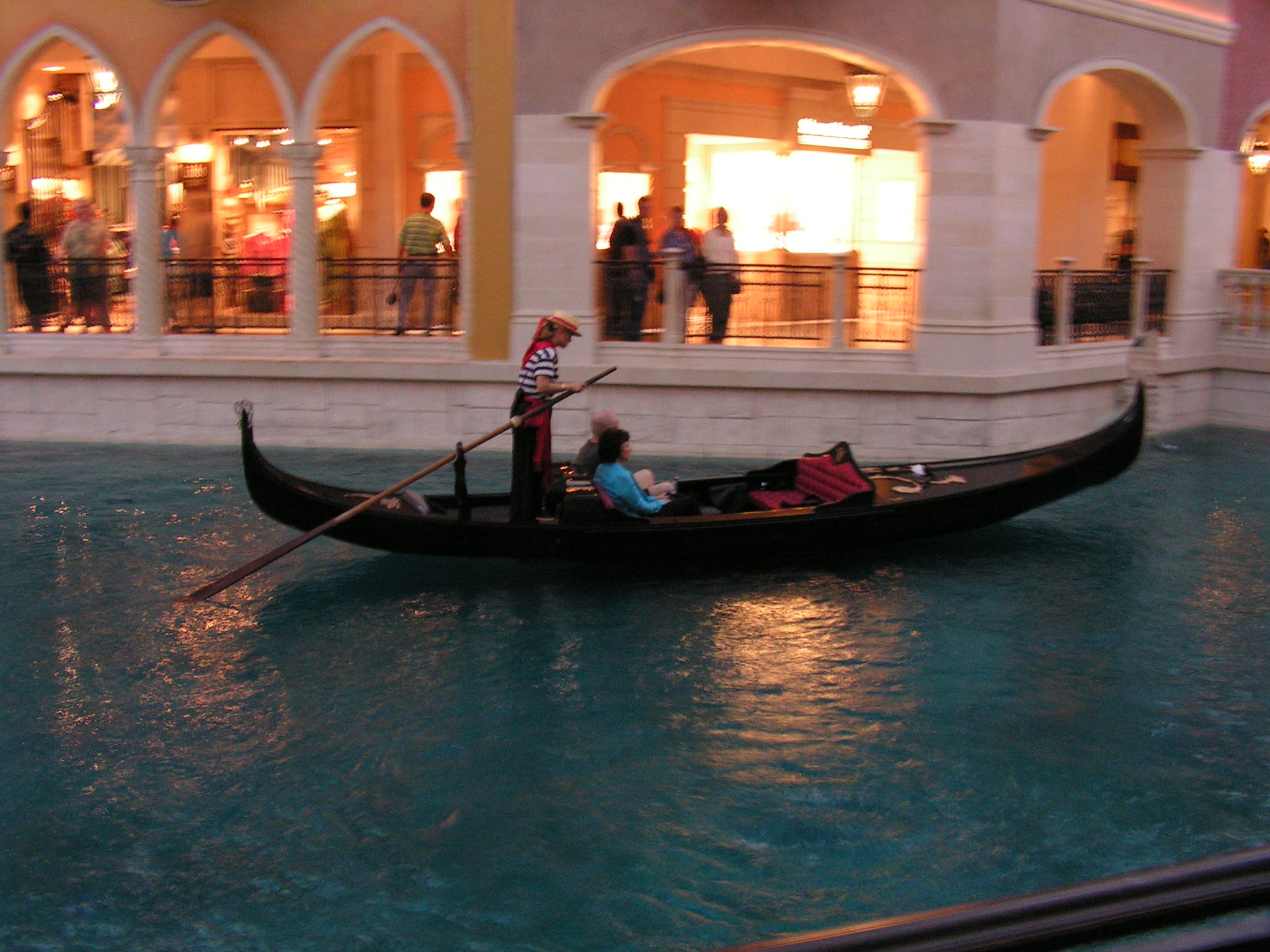 Gondola in Disneyland